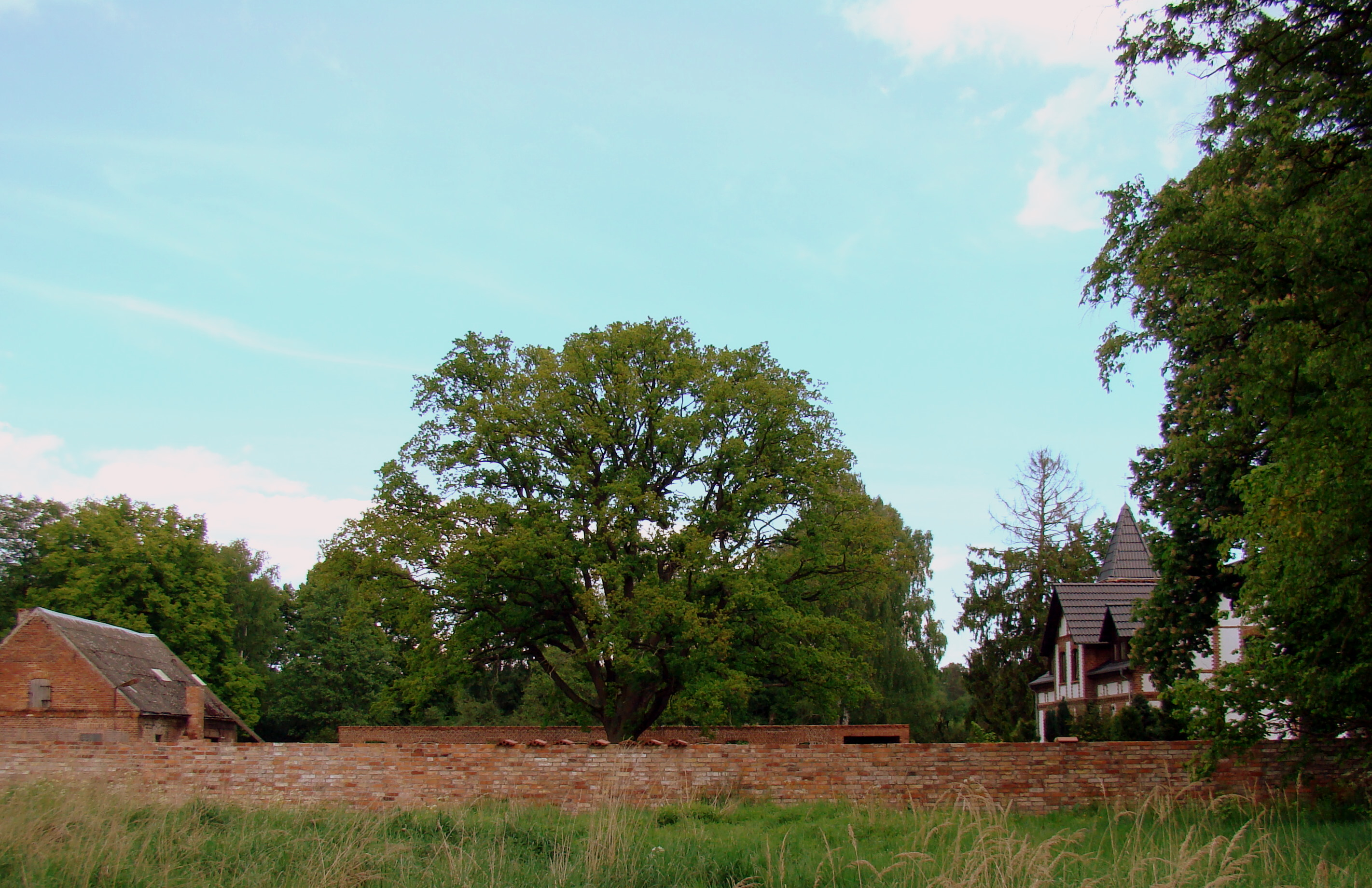 Karpin (dwór), Puszcza Wkrzańska, (Powiat policki, Województwo zachodniopomorskie), Polska